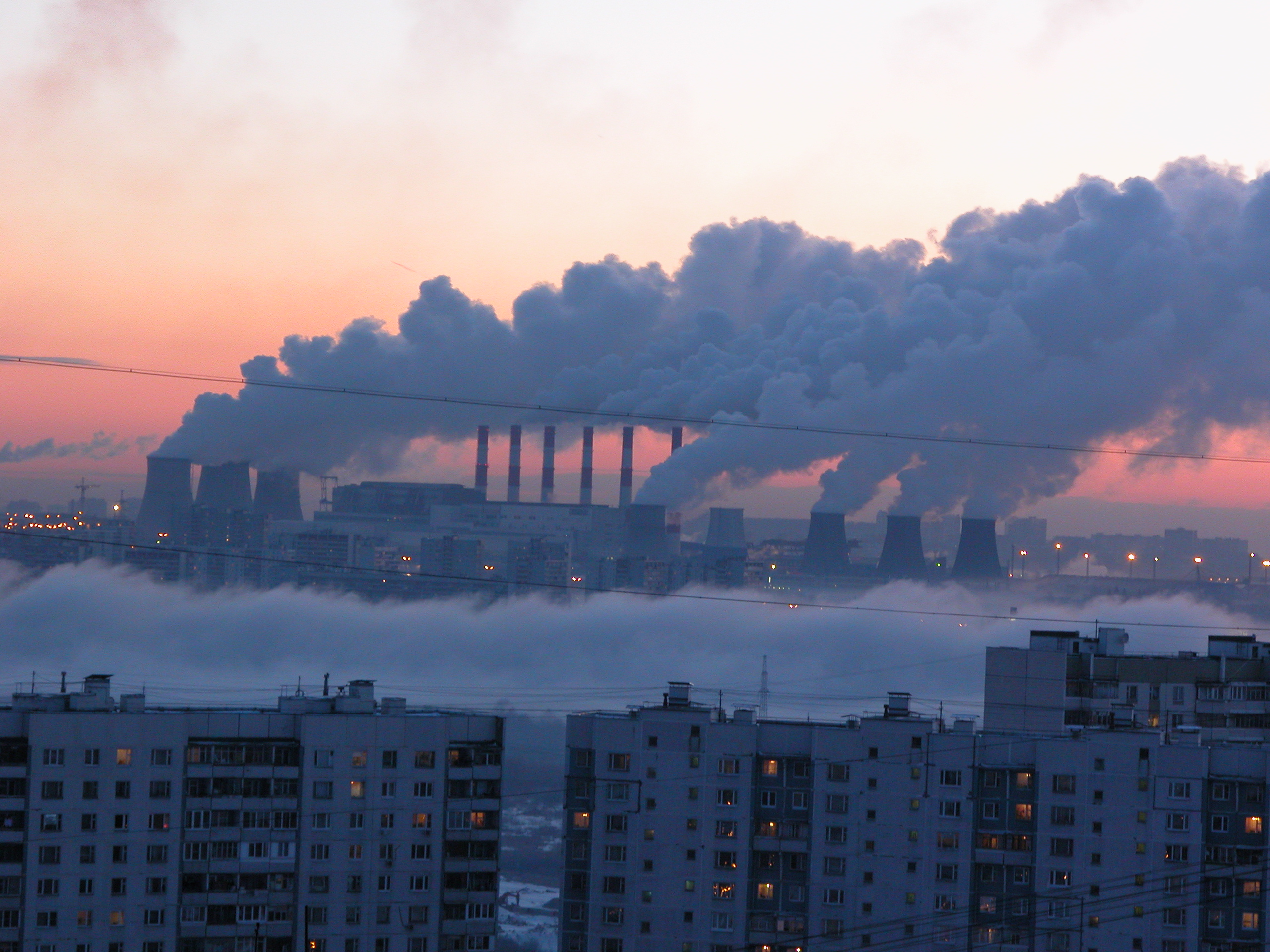 Парящая ТЭЦ в г. Дзержинском около МКАД - вид из Зябликово